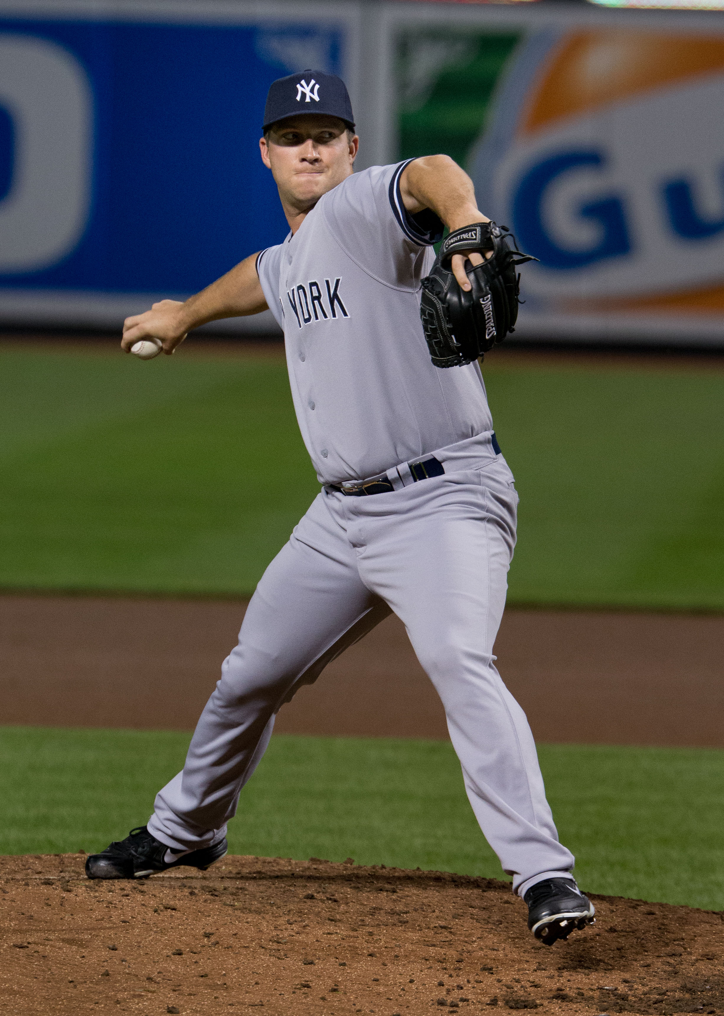 Adam Warren